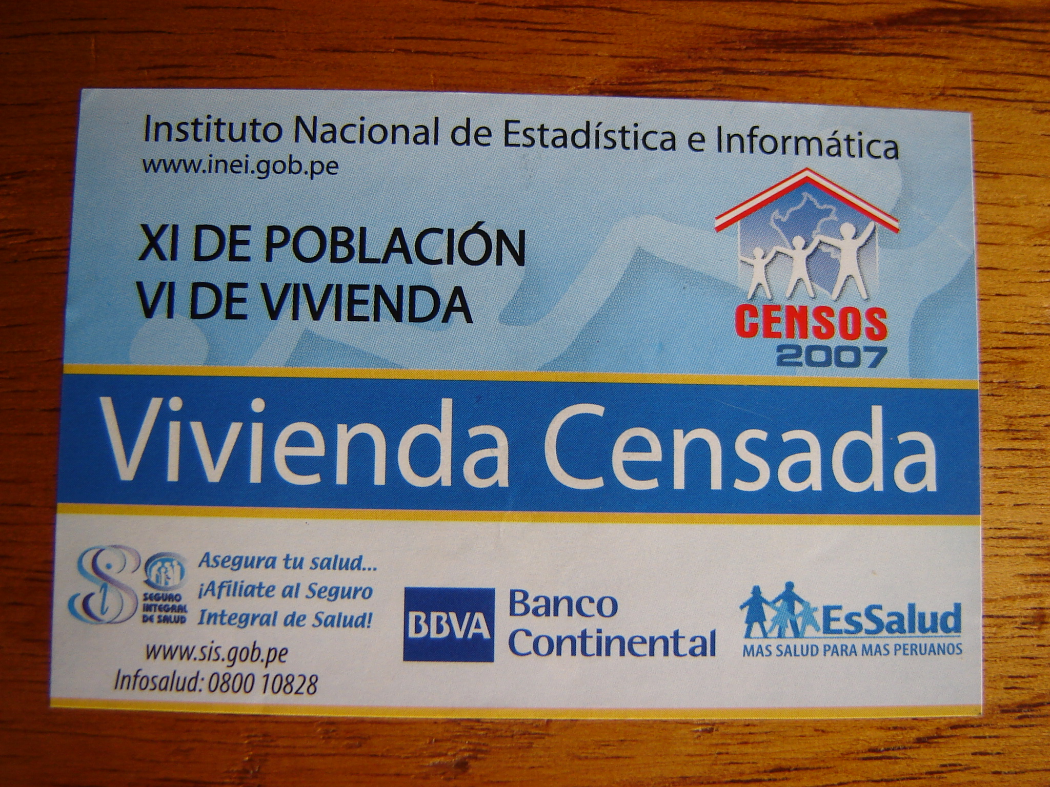 Distintivo que identifica a una vivienda empadronada (Censo de 2007 en Perú).